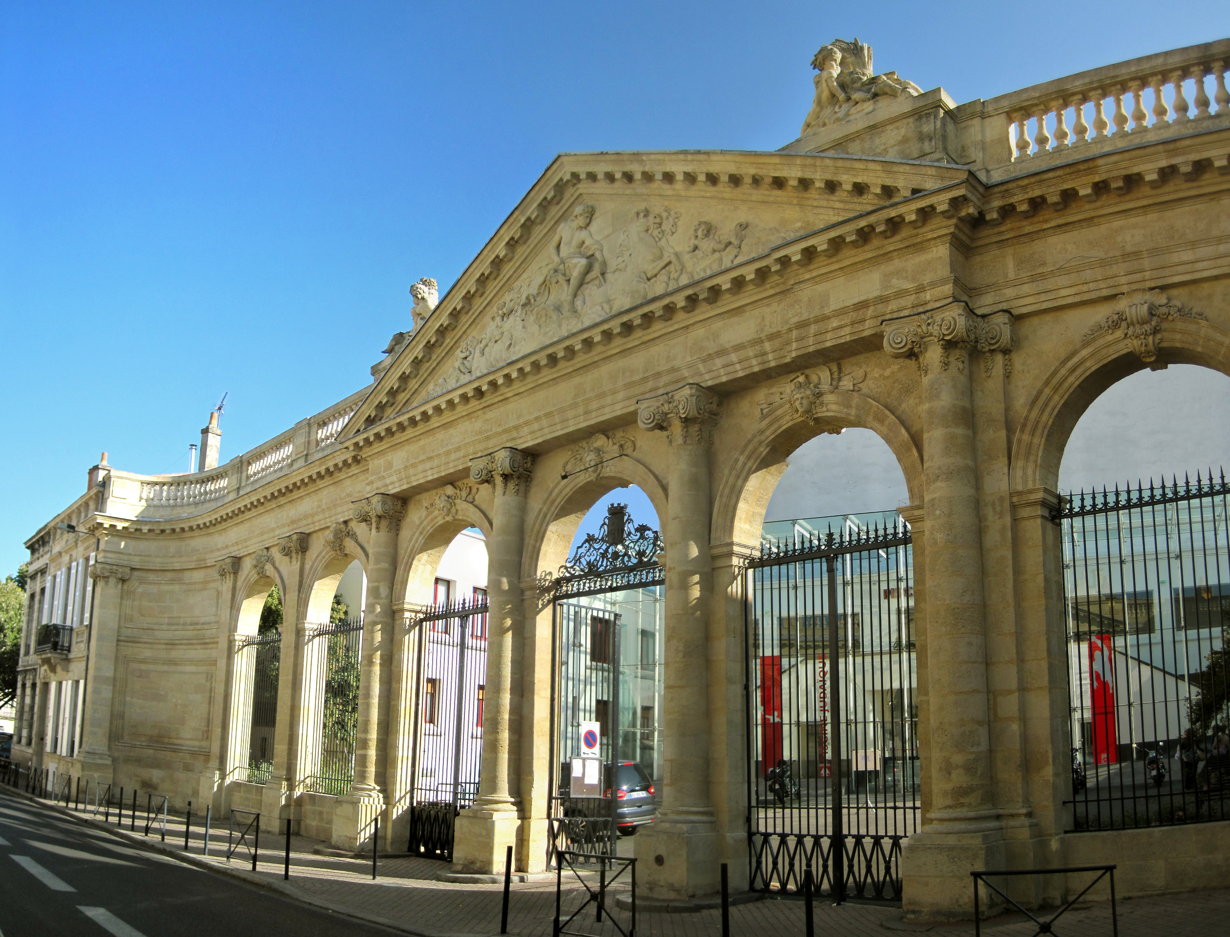 Portique du complexe sportif Judaïque à Bordeaux. 18ème siècle. Monument historique. (PA00083167)